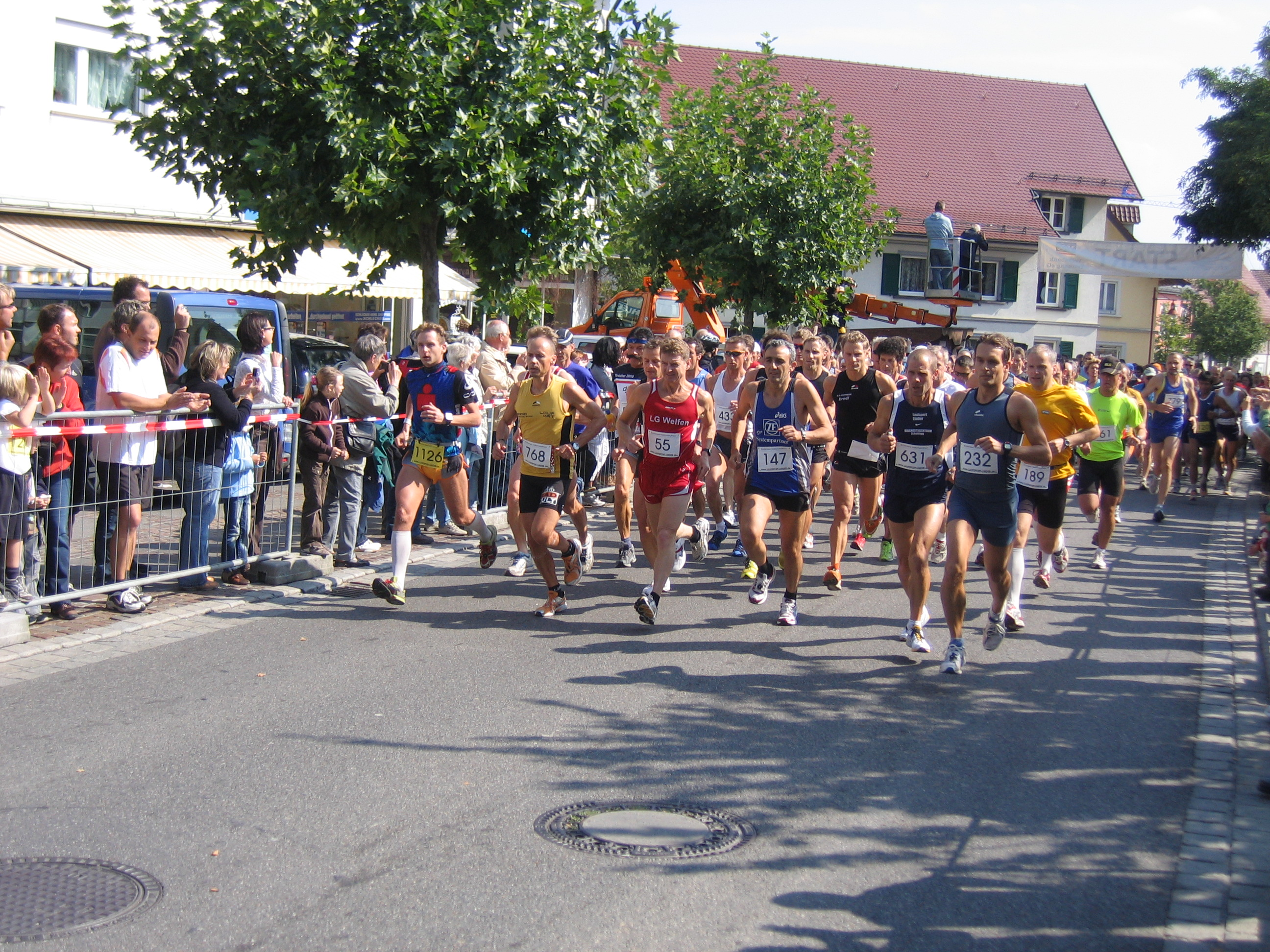 Start des Bodensee Marathons 2008